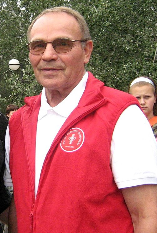 Józef Grudzień (ur. 1 kwietnia 1939 w Piaskach Wielkich koło Buska-Zdroju) – bokser, mistrz i wicemistrz olimpijski.